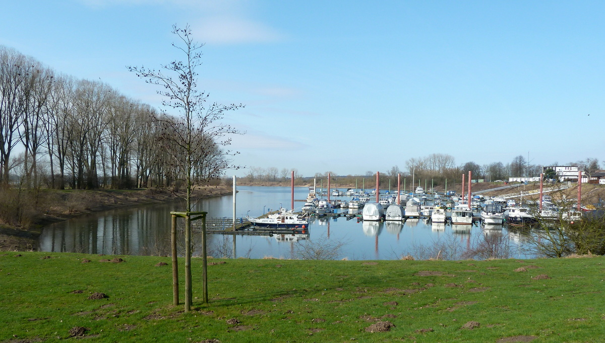 Wesel, Germany